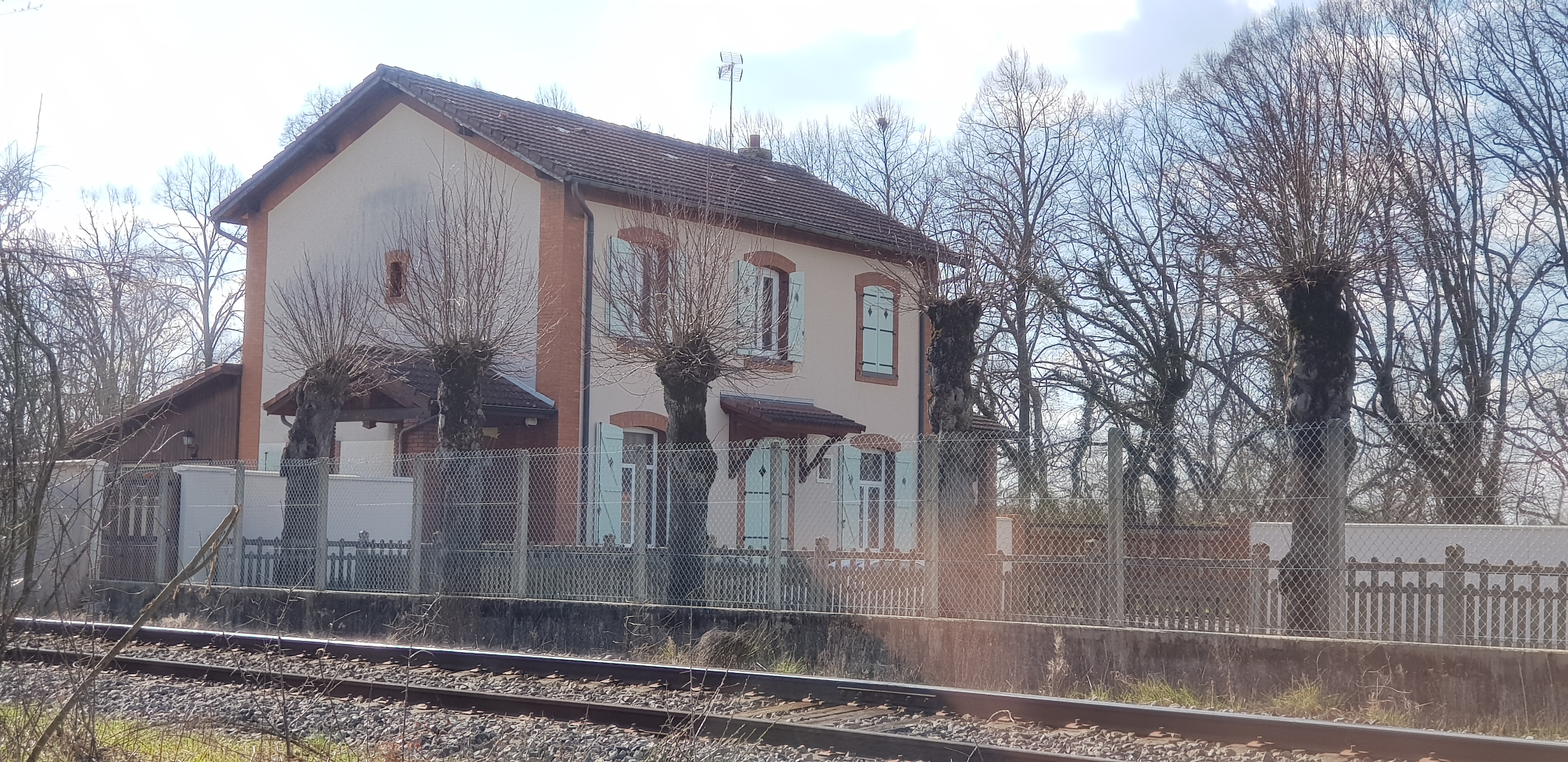 Gare à Thiers